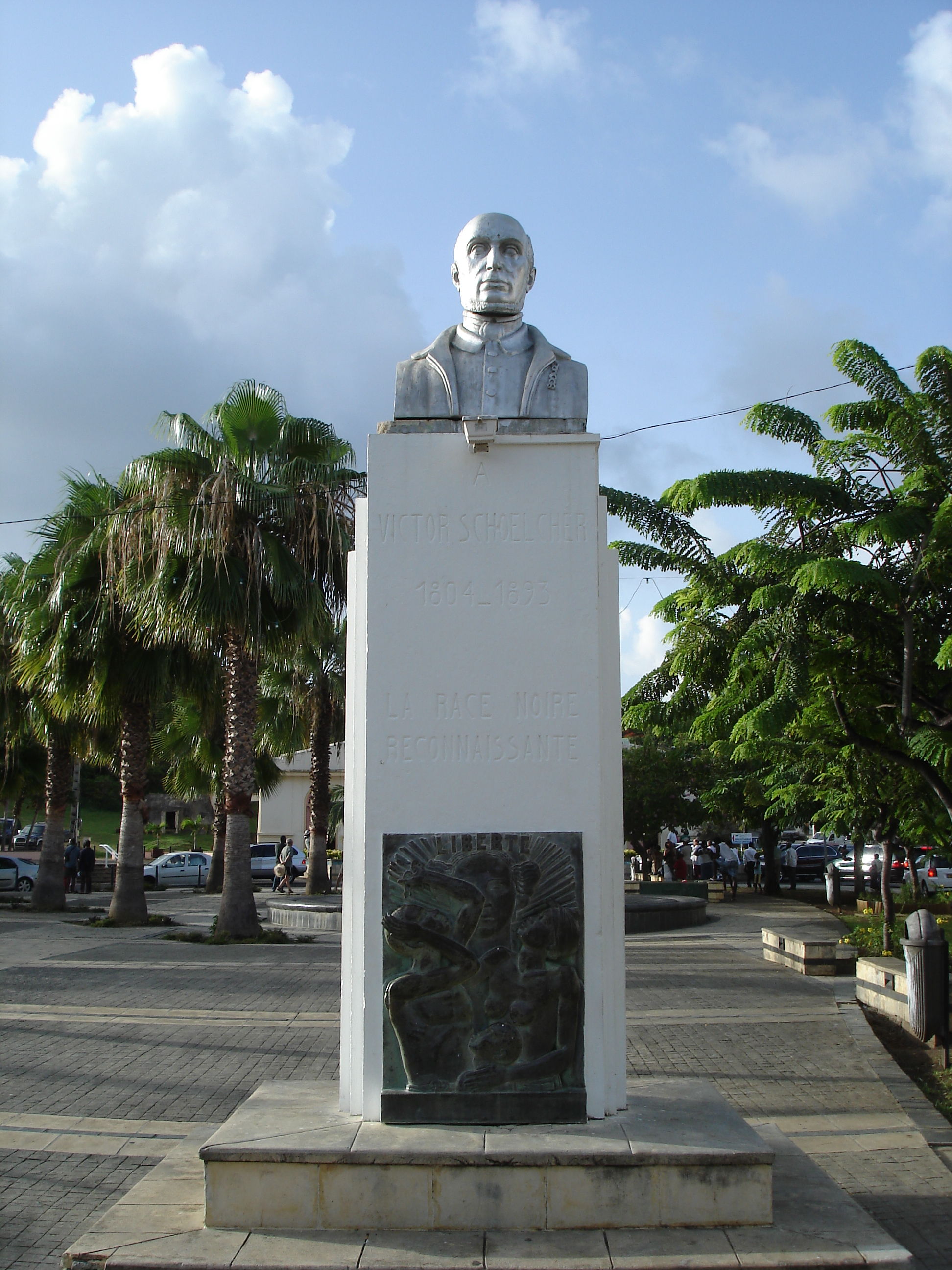 Buste de Victor Schoelcher (1804-1893) : La race noire reconnaissante. Ce buste est érigé sur la place de l'église de Sainte-Anne (Guadeloupe) - France